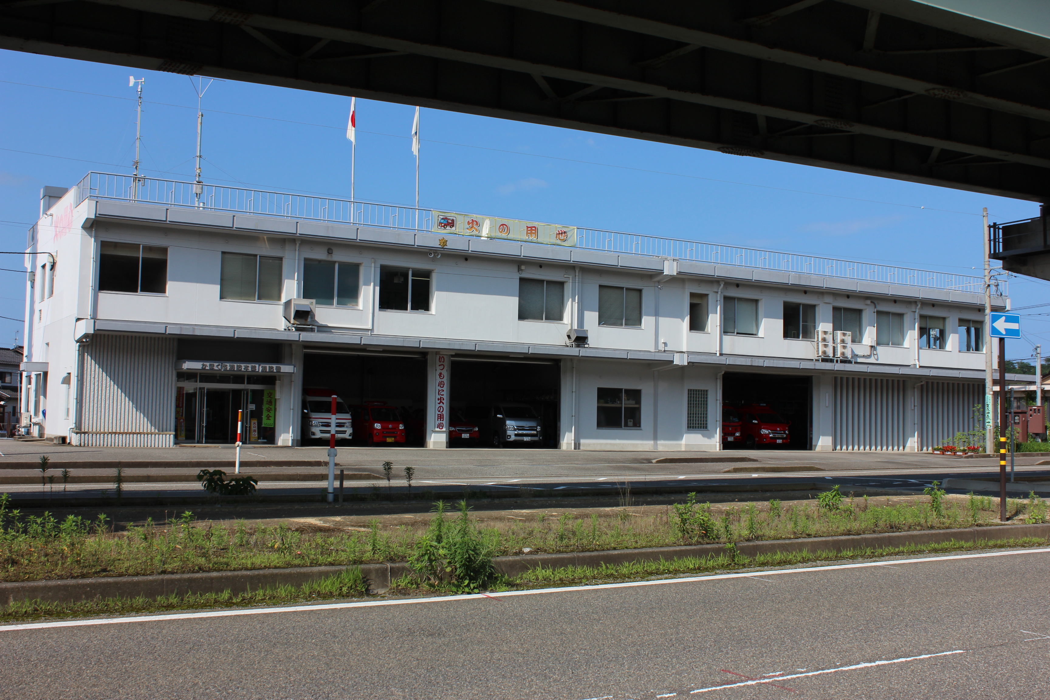 かほく市消防本部・消防署（石川県かほく市） Canon EOS Kiss X5